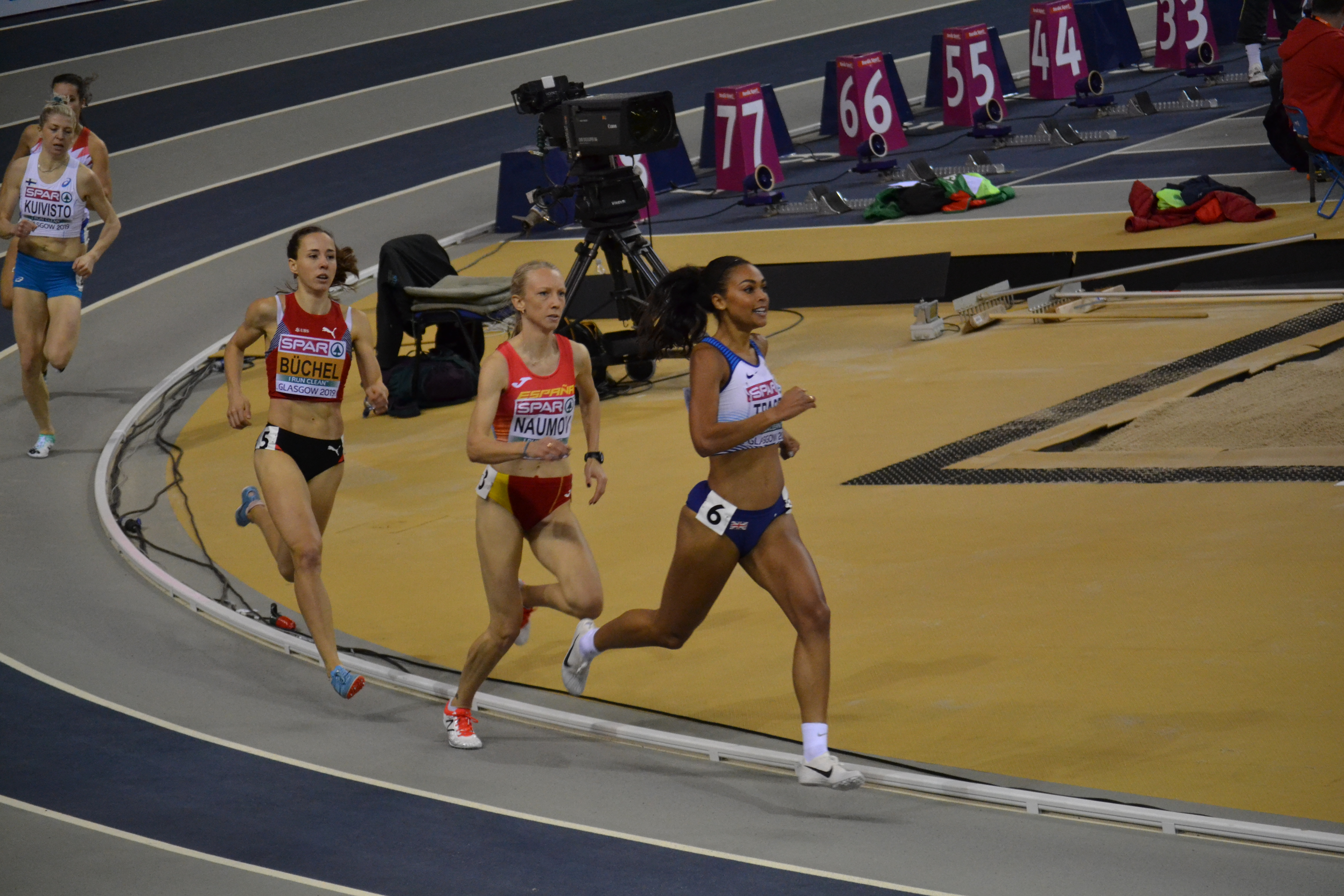 Womens 800m